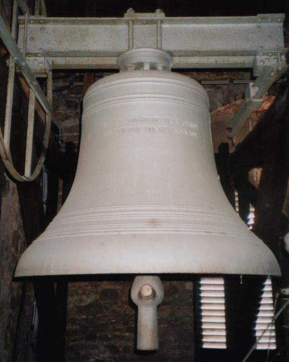 „Totenglocke“ (c′) in der Lemgoer Marienkirche